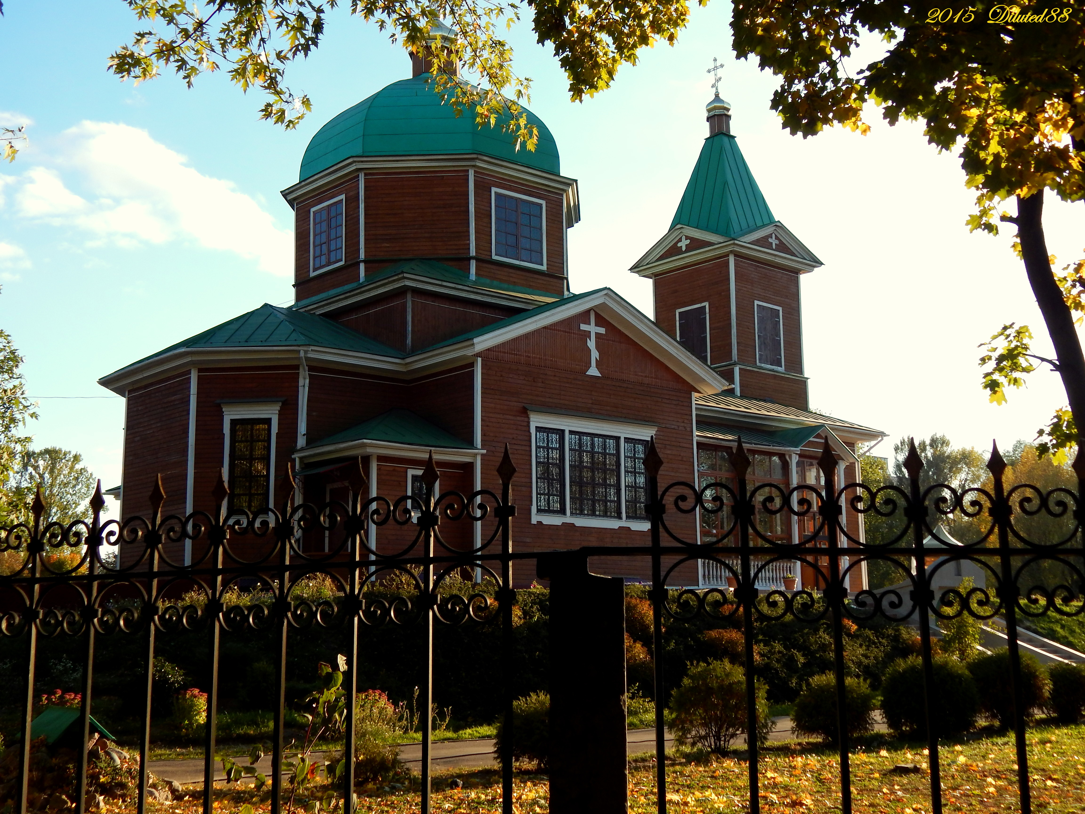 Вельмі прыгожы Храм Святога Архістратыга Міхаіла ... Very beautiful Church of St. Michael the Archangel